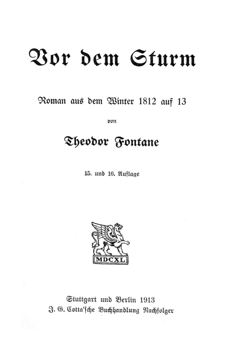 Theodor Fontane: Vor dem Sturm. Roman aus dem Winter 1812 auf 13. (1878) Titelseite der 15. und 16. Auflage, Stuttgart/Berlin (Cotta) 1913